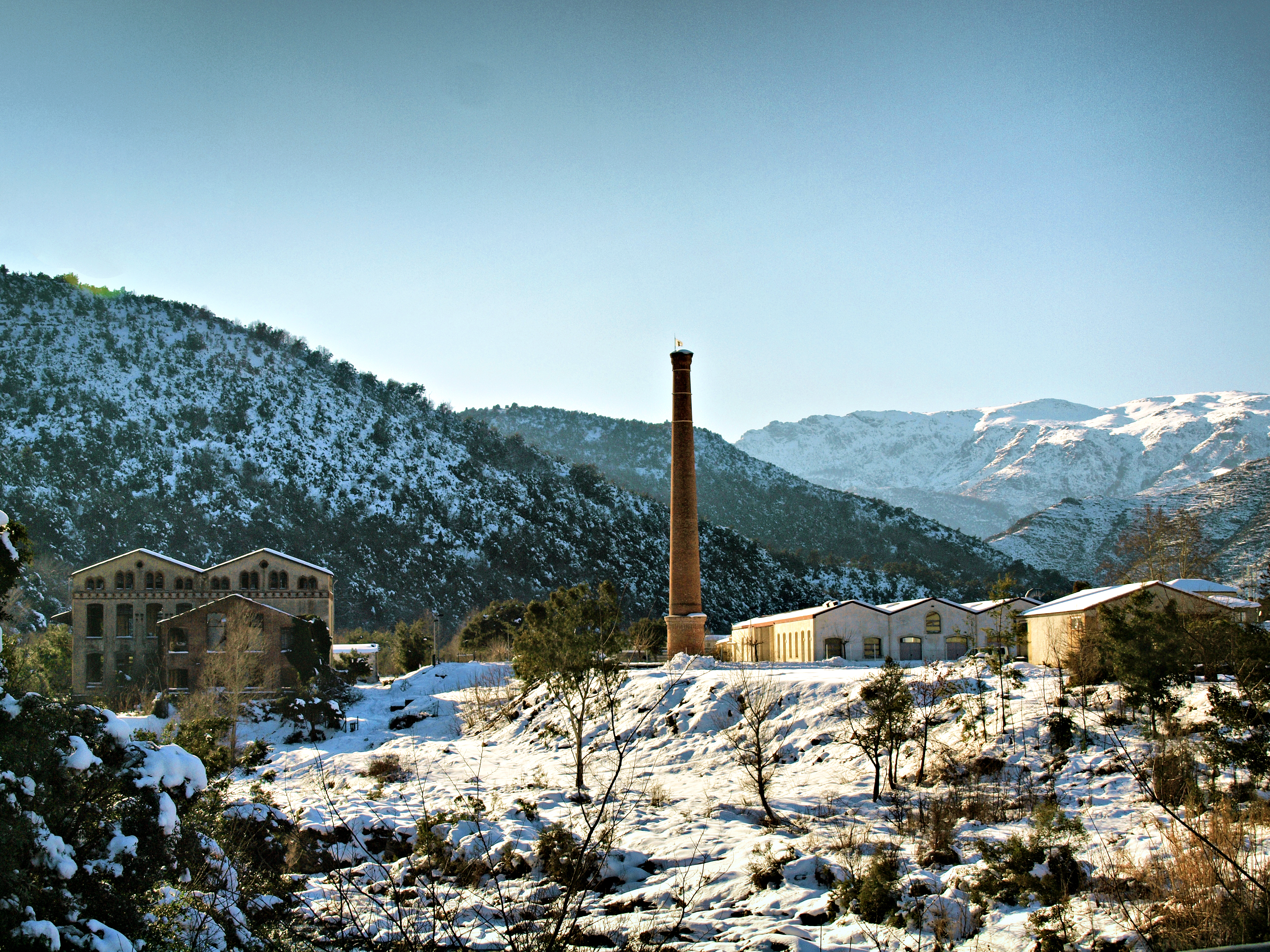 Volpajola, Costera (Corse) - Ensemble d'industrie du bois de Barchetta